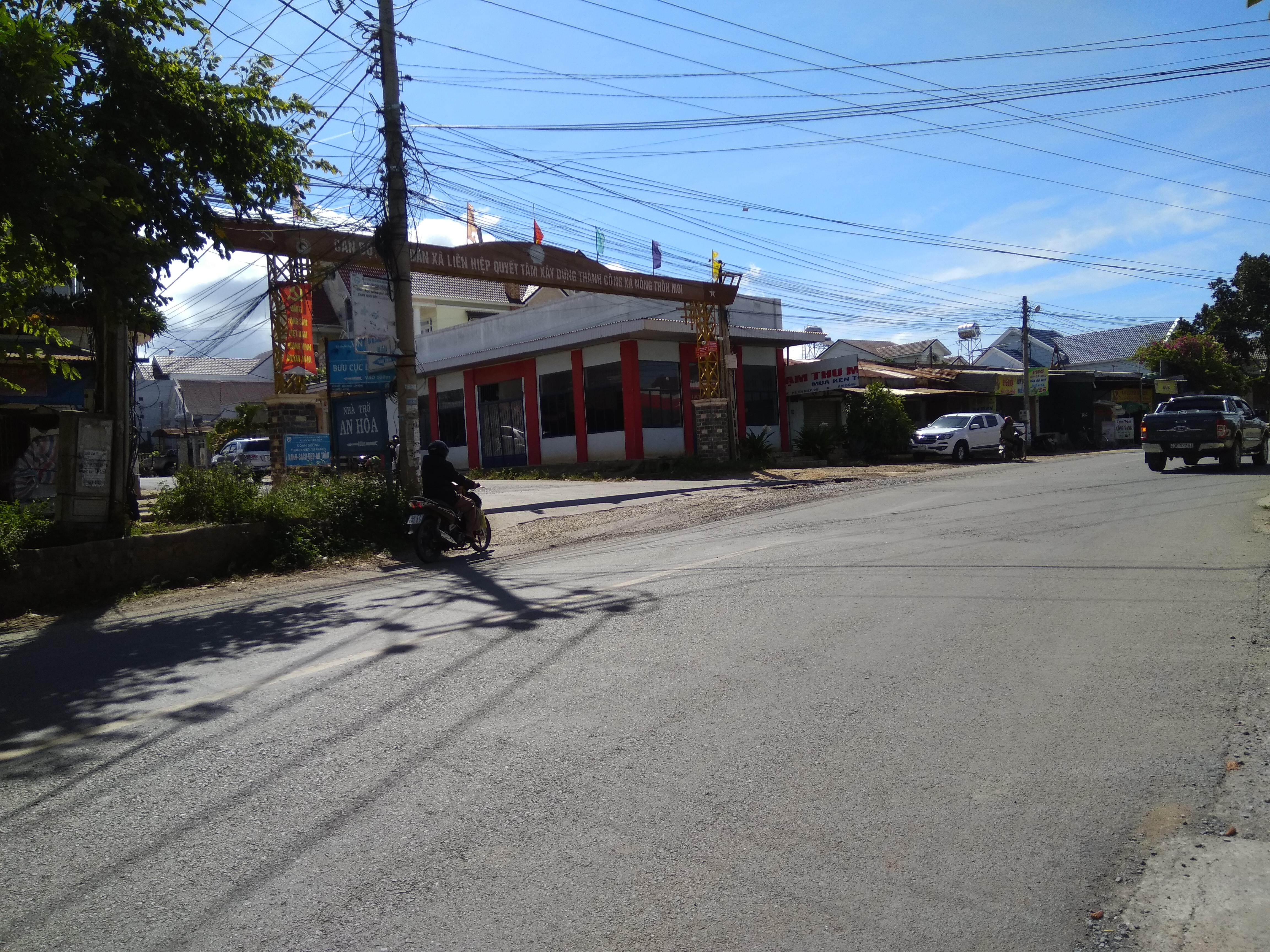 Cổng Vàng